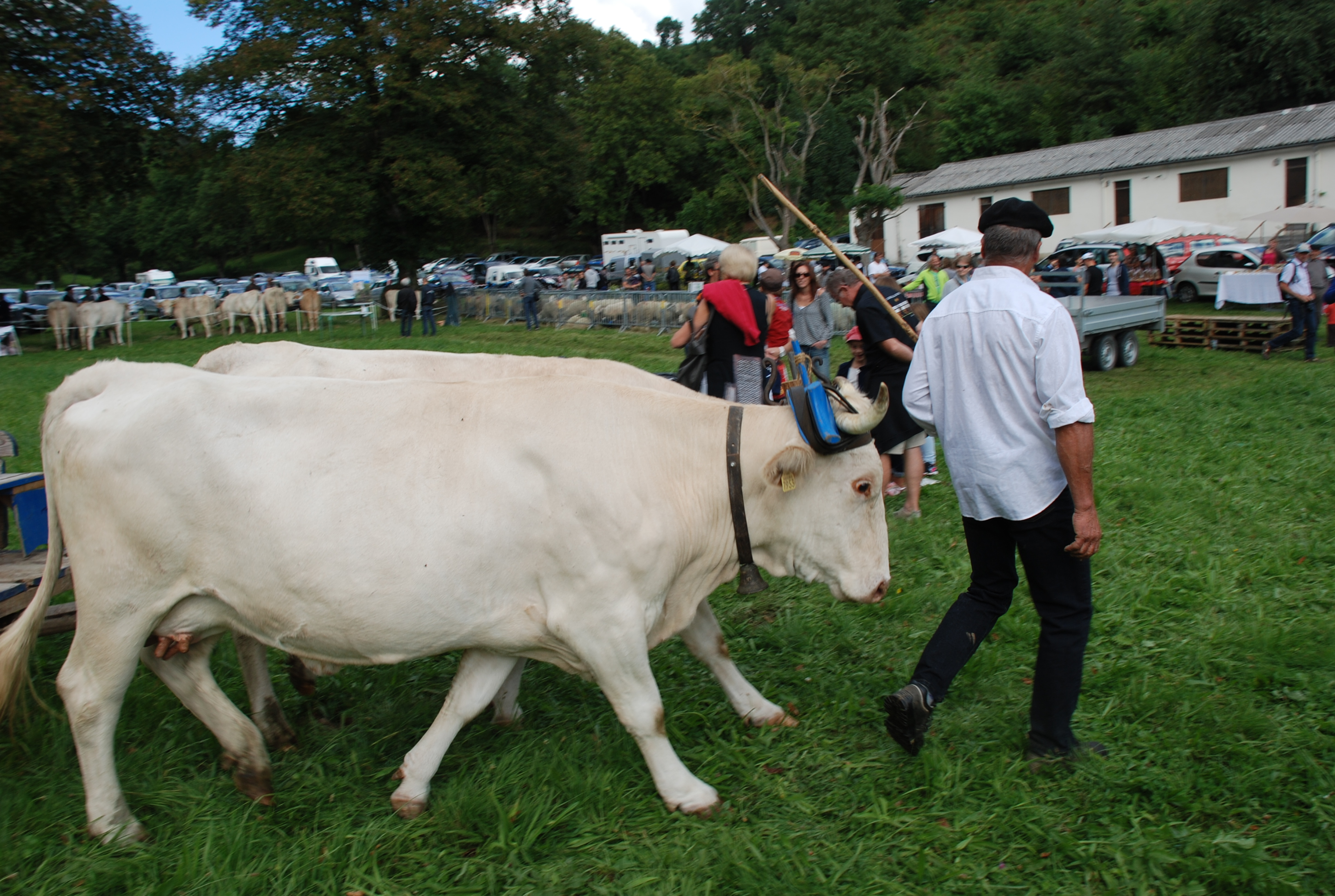 Attelage de vaches lourdaises photographiées à Aspin-en-Lavedan, lors de la première fête de la vache et de la brebis lourdaises les samedi 5 et dimanche 6 septembre 2015